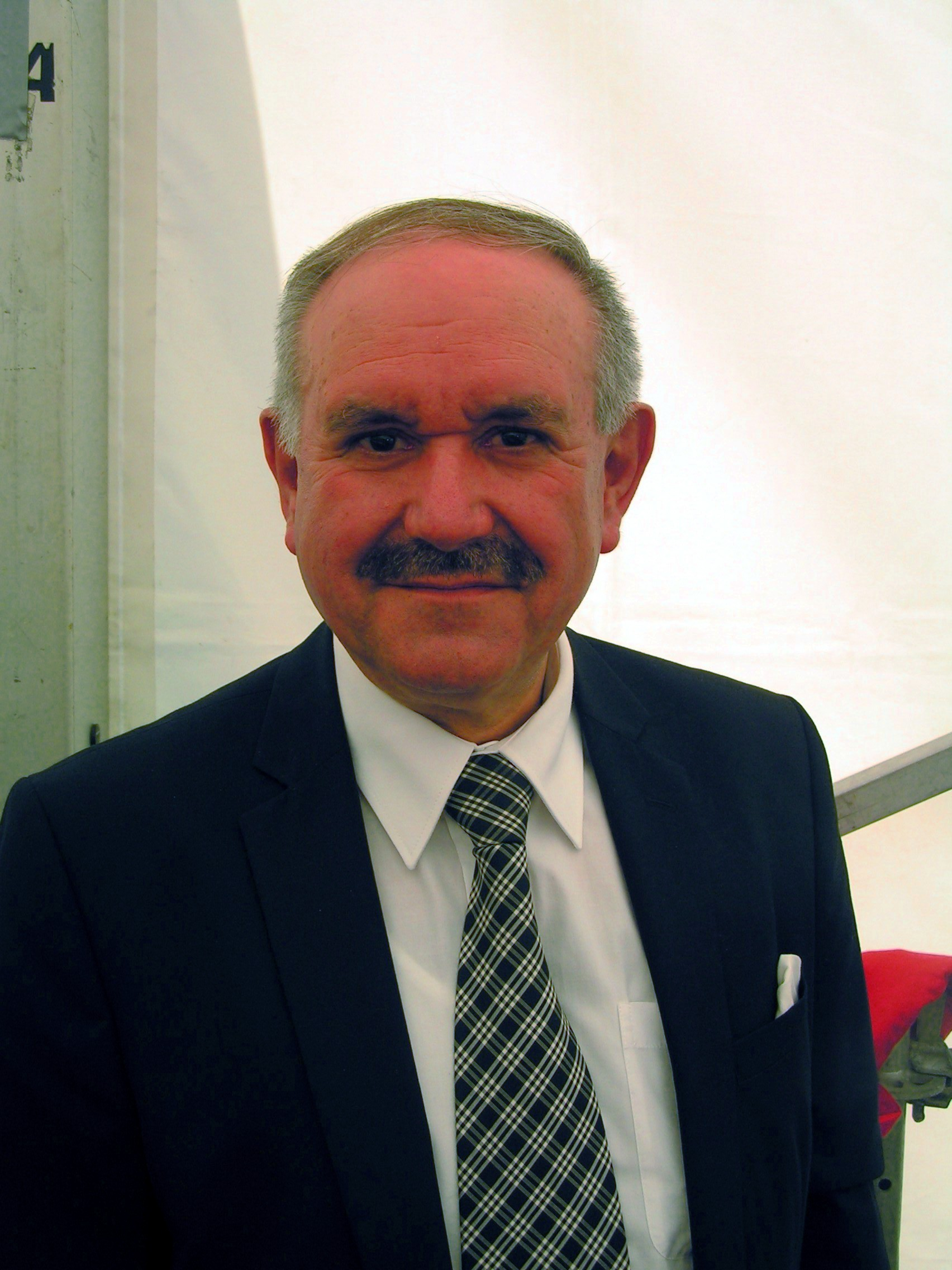 Zürcher Regierungsrat Hans Hollenstein